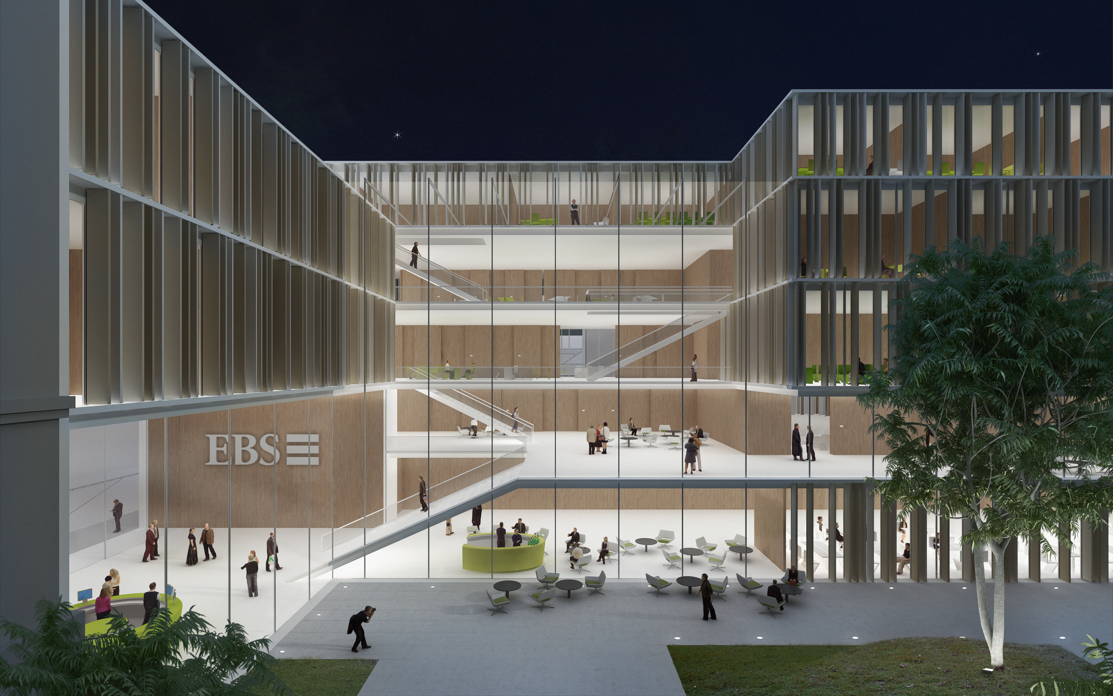 Studienort Altes Landgericht Wiesbaden ab 2014